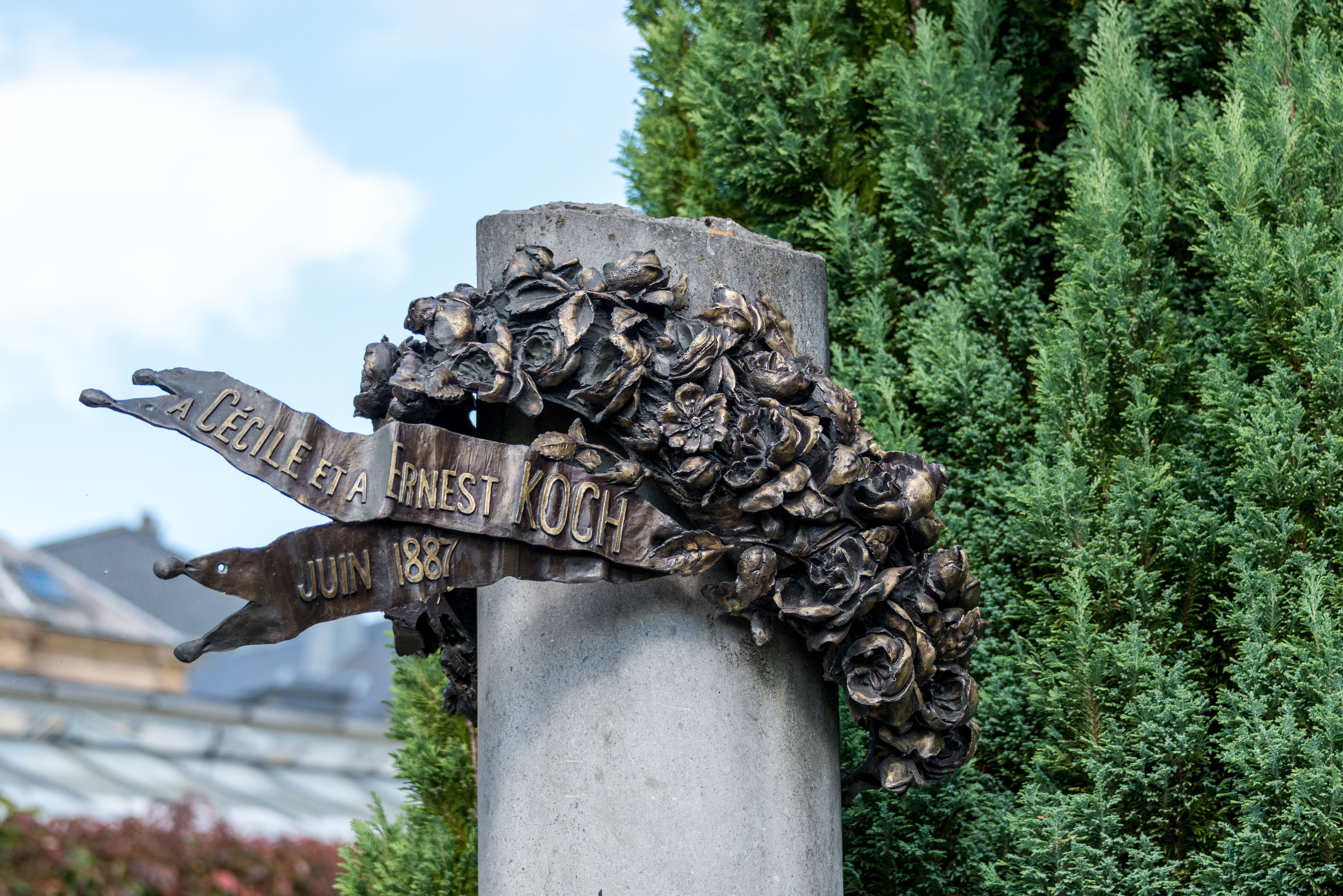 À Cécile et à Ernest Koch, juin 1887 um Nikloskierfecht.